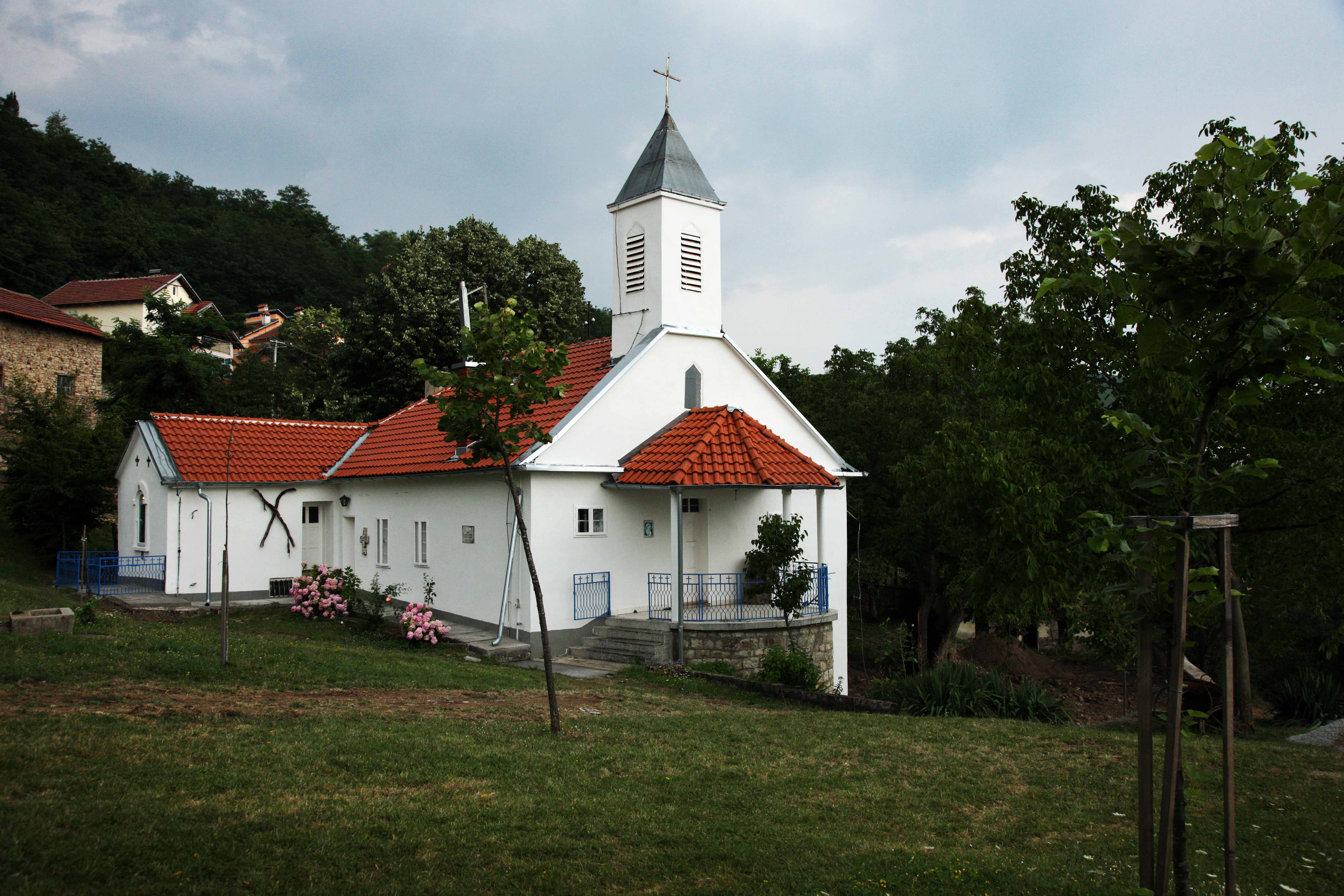 Shkolla e pare shqipe